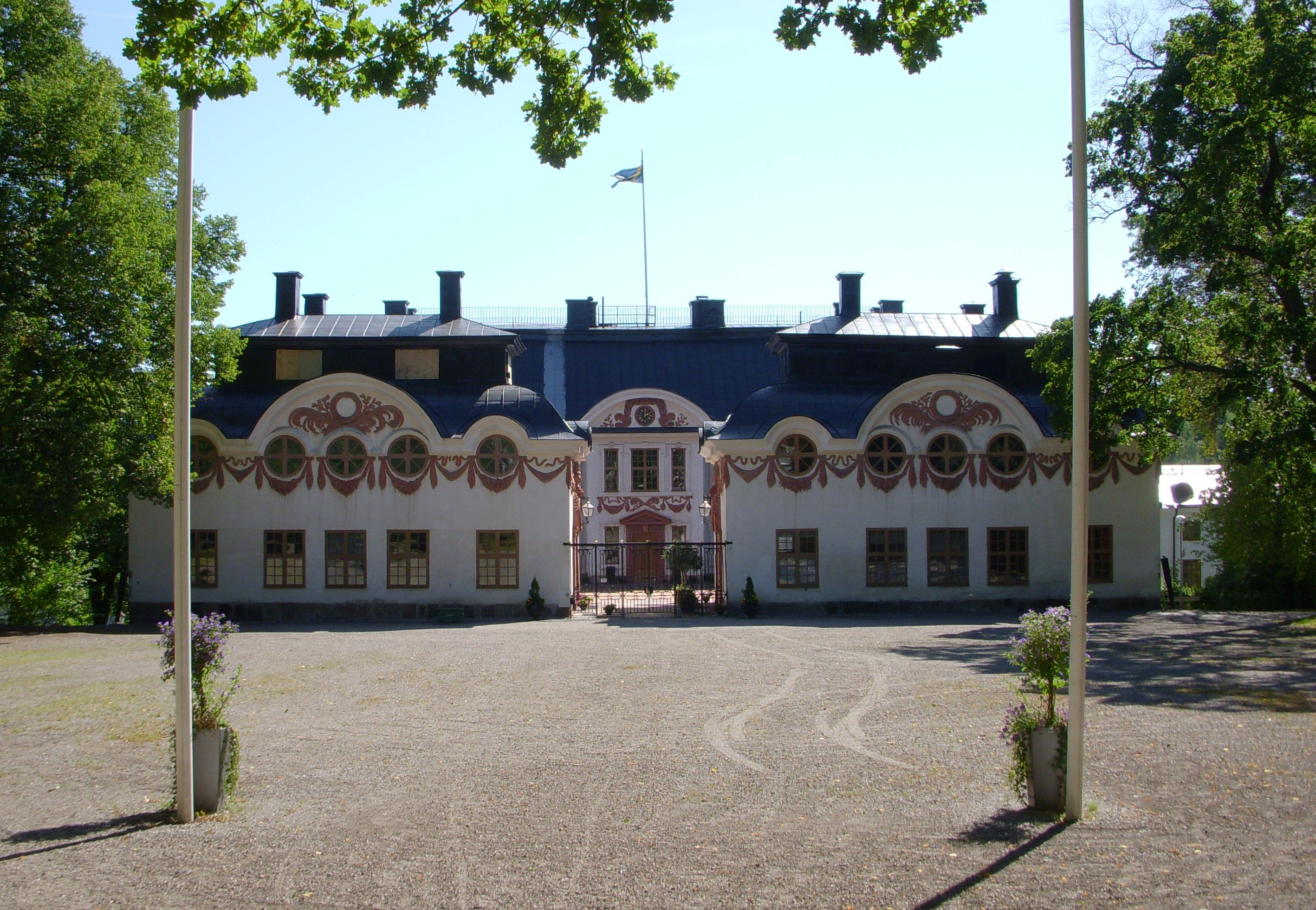 Karlbergs slott, Solna, norrsidan